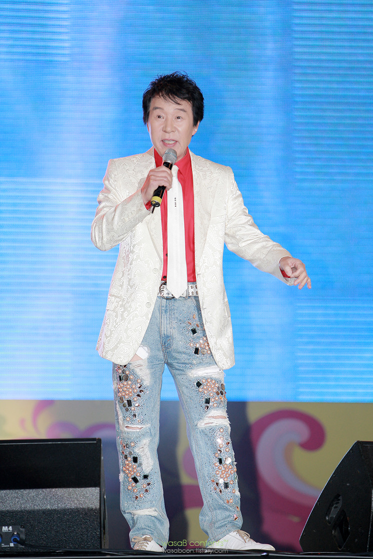 가수 송대관